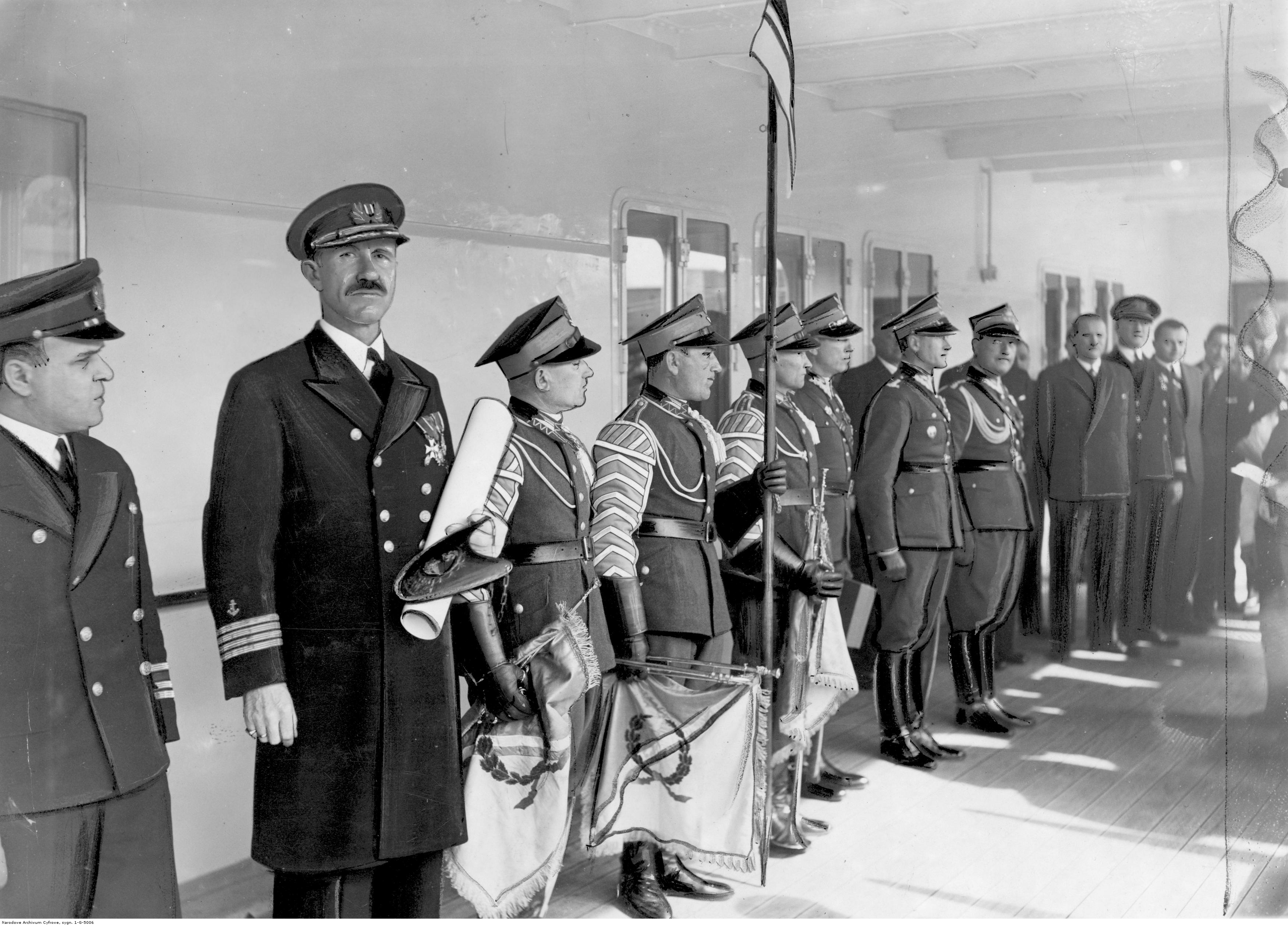 Statek pasażerski m/s "Batory". Uroczystość wręczenia kapitanowi Eustazemu Borkowskiemu odznaki pułkowej dla statku "Batory", nad którym 27 Pułk Ułanów im. króla Stefana Batorego sprawował patronat. Od lewej stoją: I mechanik inżynier Szymon Kupis, komendant statku kapitan Eustazy Borkowski, dalej - delegacja pułkowa. Koncern Ilustrowany Kurier Codzienny - Archiwum Ilustracji. Sygnatura: 1-G-5006